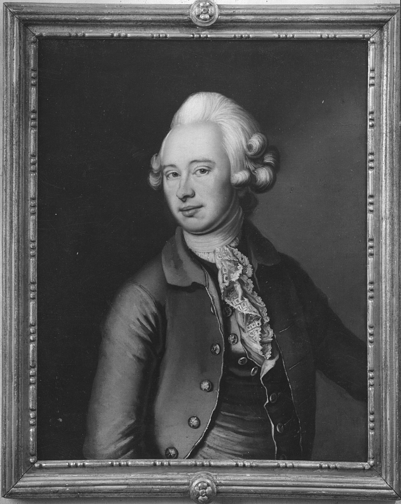 Justisråd, Sorenskriver Peter Georg Boll, malt av Erik Pauelsen